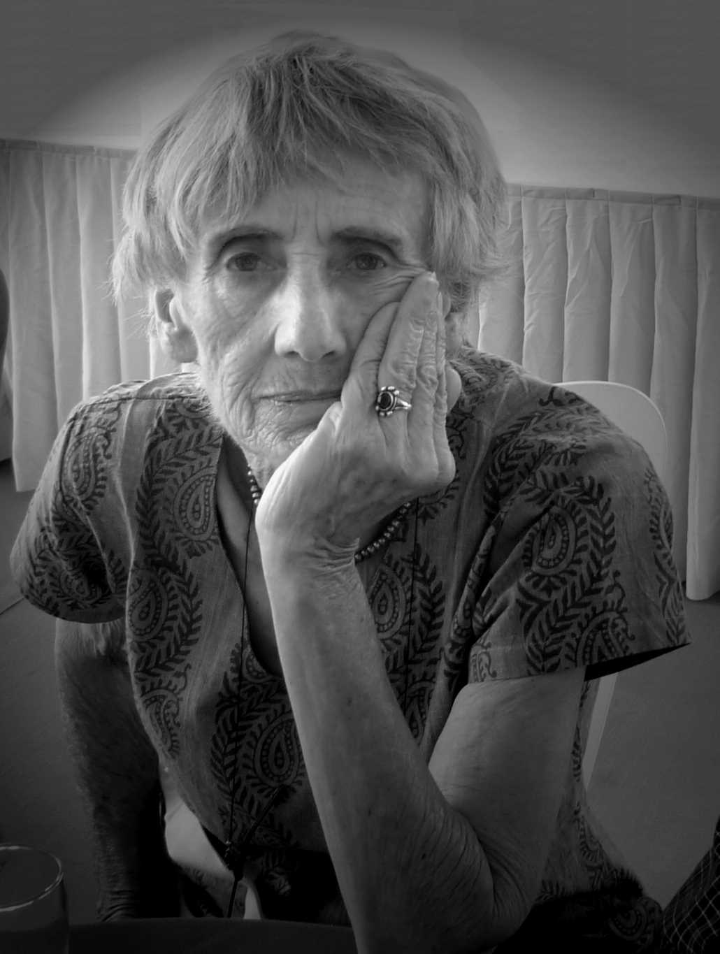 La poetisa Rowena Hill en el Festival Arts Beijing 2011.